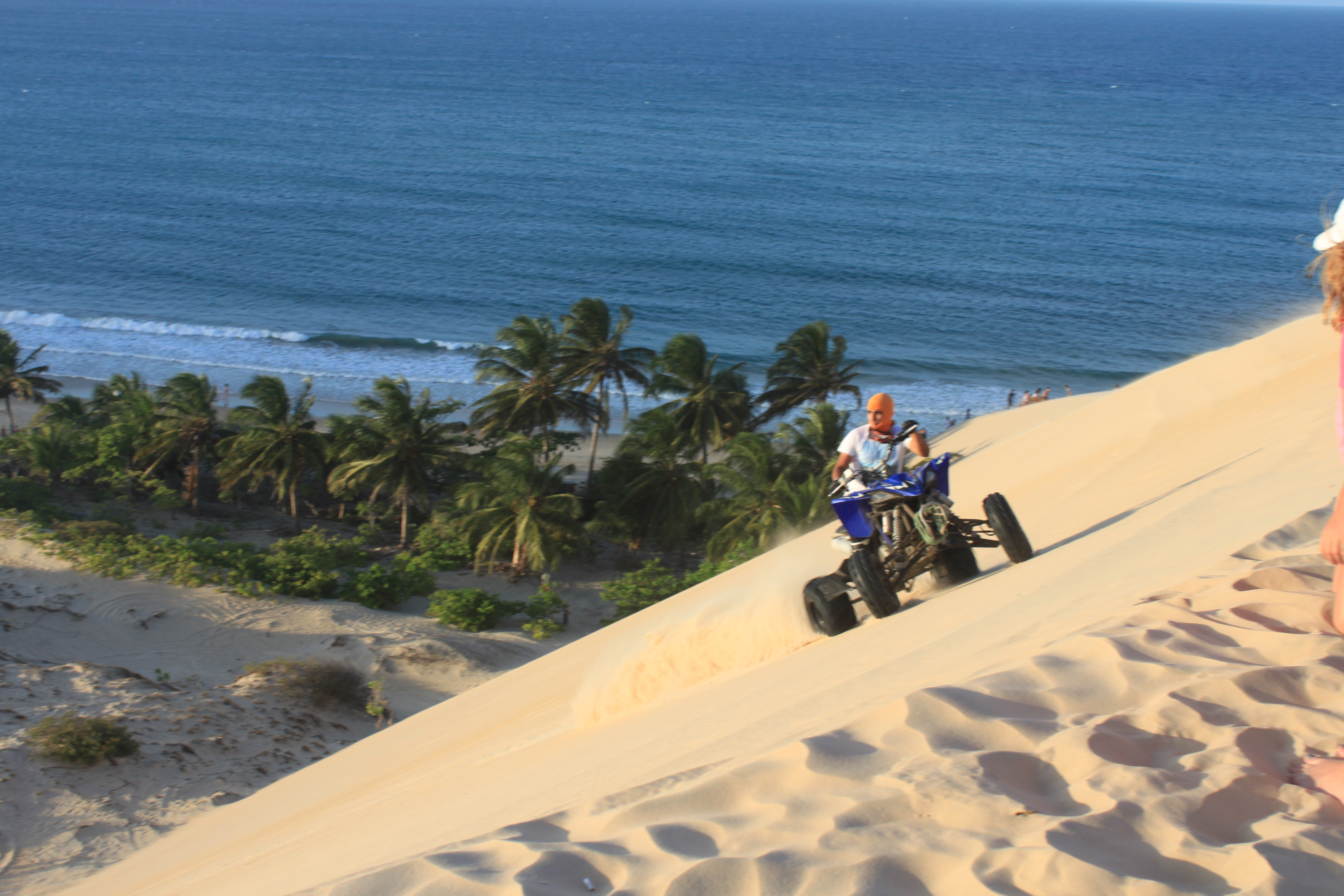 A prática de esporte off-road é muito comum nas dunas.